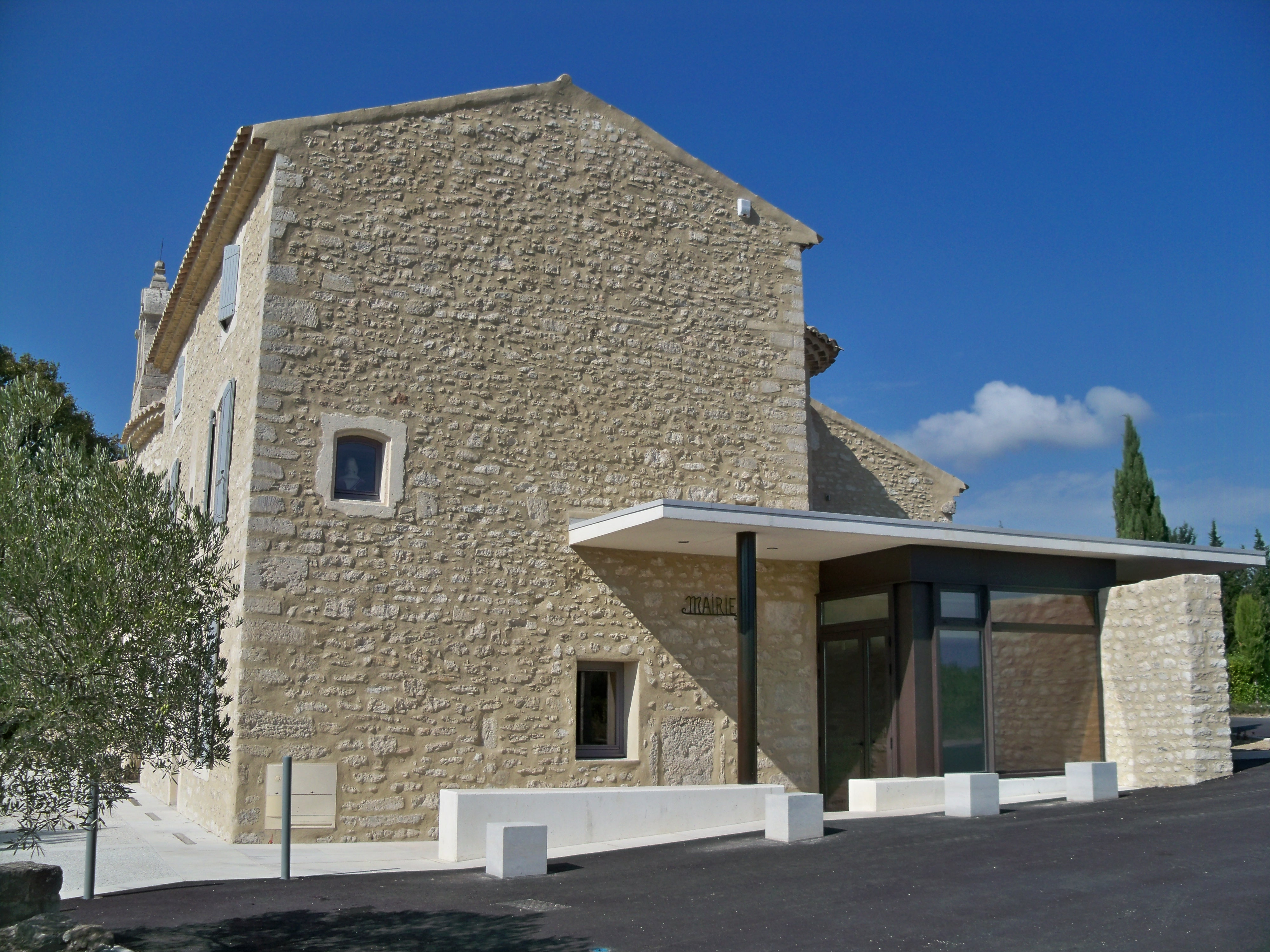 Mairie de Solérieux (26)